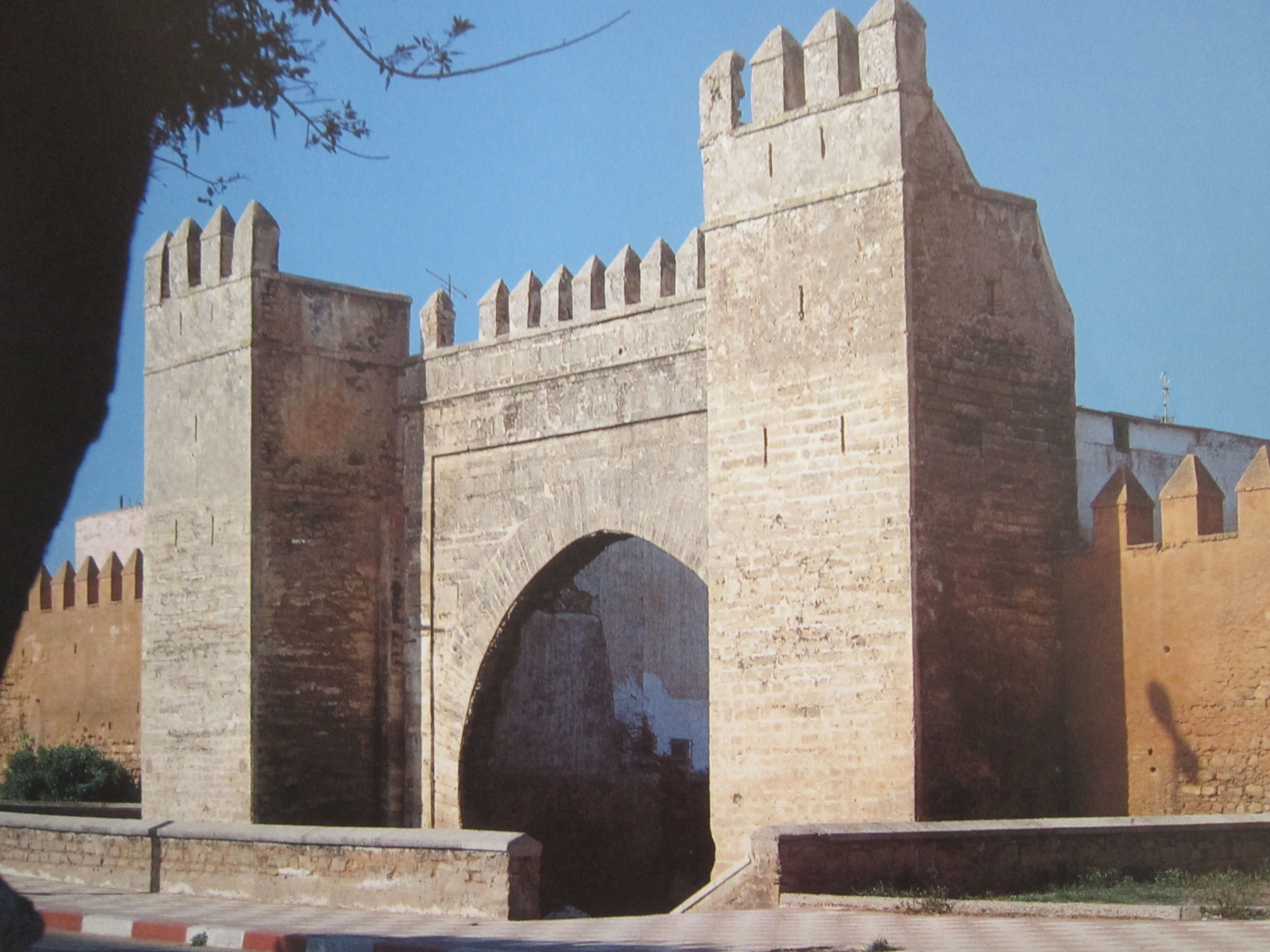 Dar Assinaa Sala